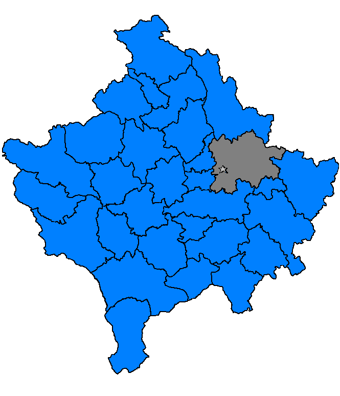 Prishtinë, Kosovë 2006